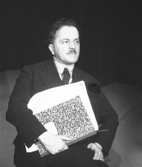 Bronisław Wallek-Walewski (Kraków)